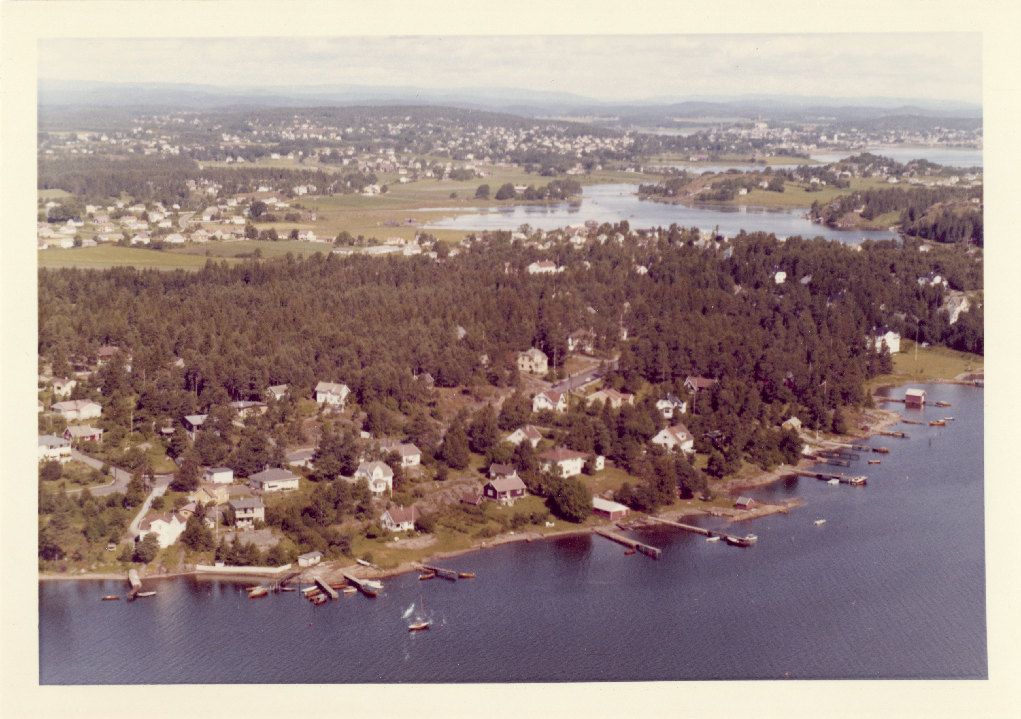 WF.S.85187 Breidablikk Sjømannshjem til høyre i bildet.